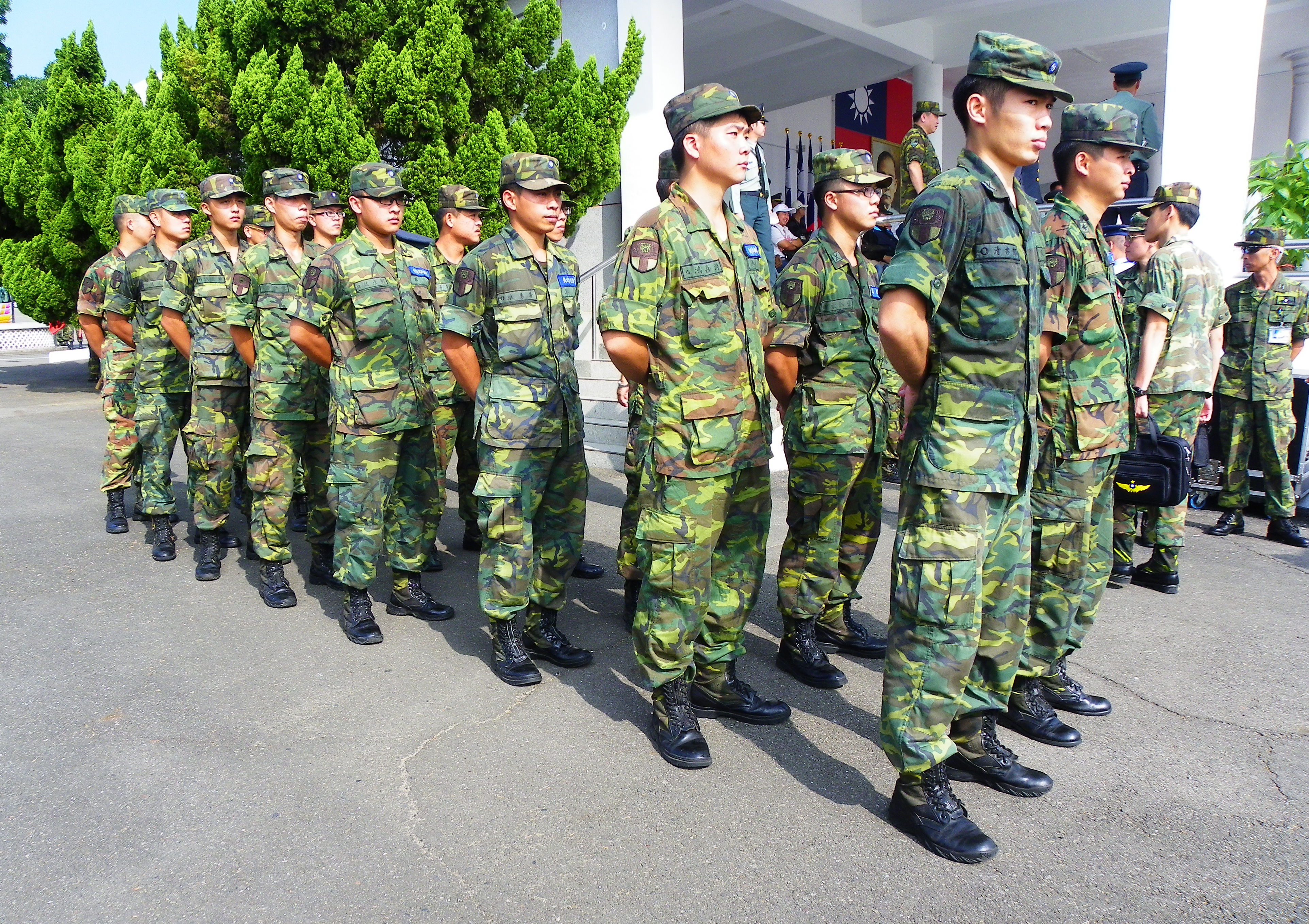 活動開始前，介壽臺南側稍息待命進場支援的302旅兵士。